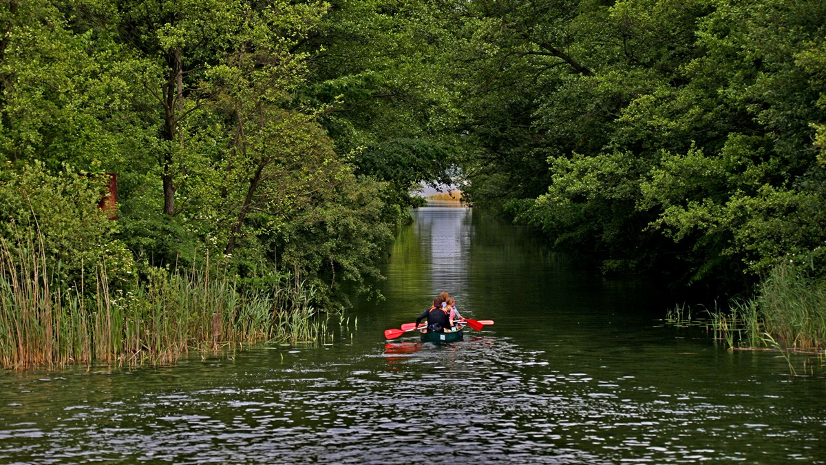 Nordufer des Leppinsees, Einfahrt zum Bolter Kanal